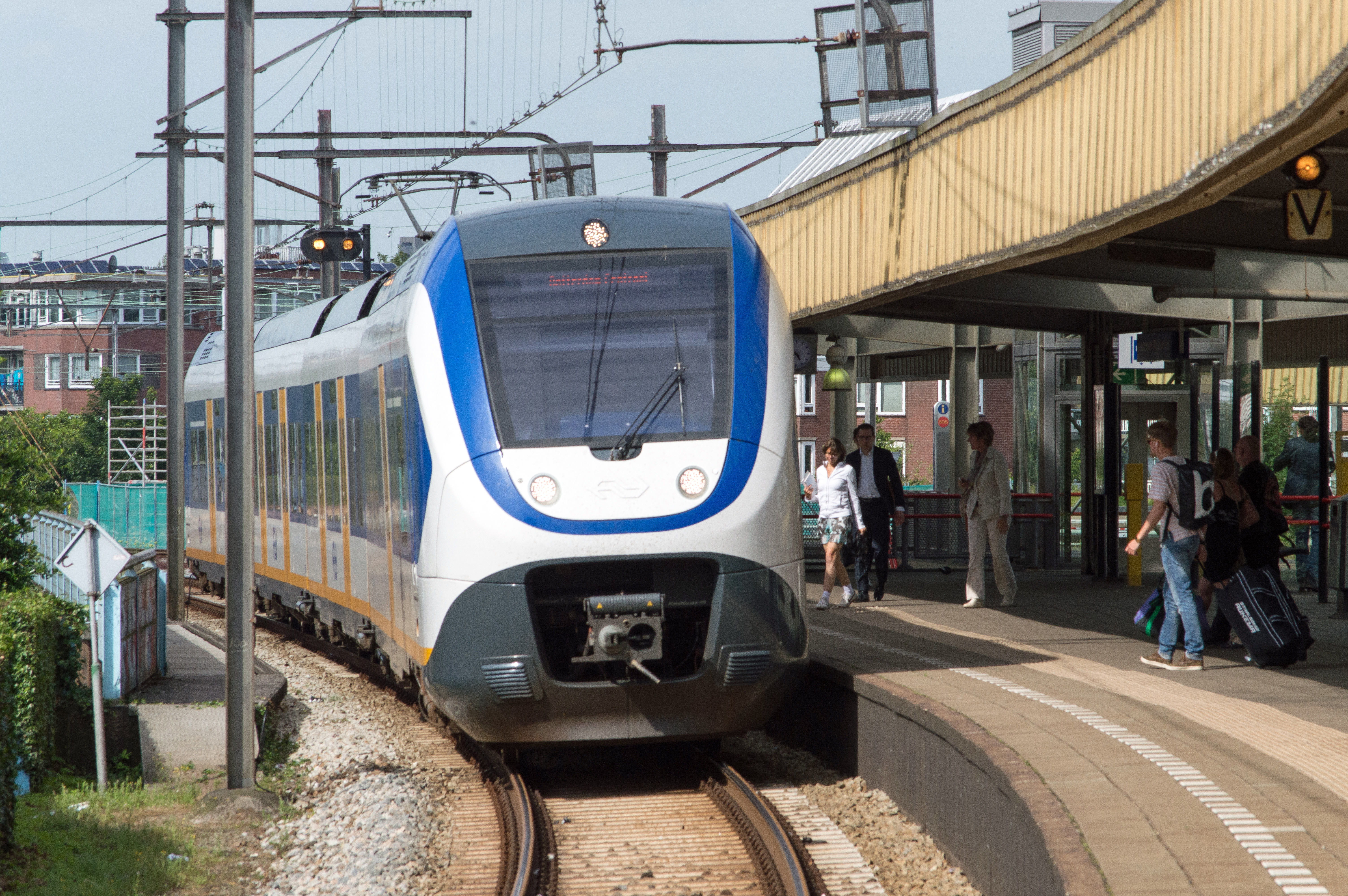 De Sprinter naar Rotterdam via Breukelen stopt hier op station Muiderpoort. A Sprinter train stops on his way to Rotterdam at Amsterdam Muiderpoort.